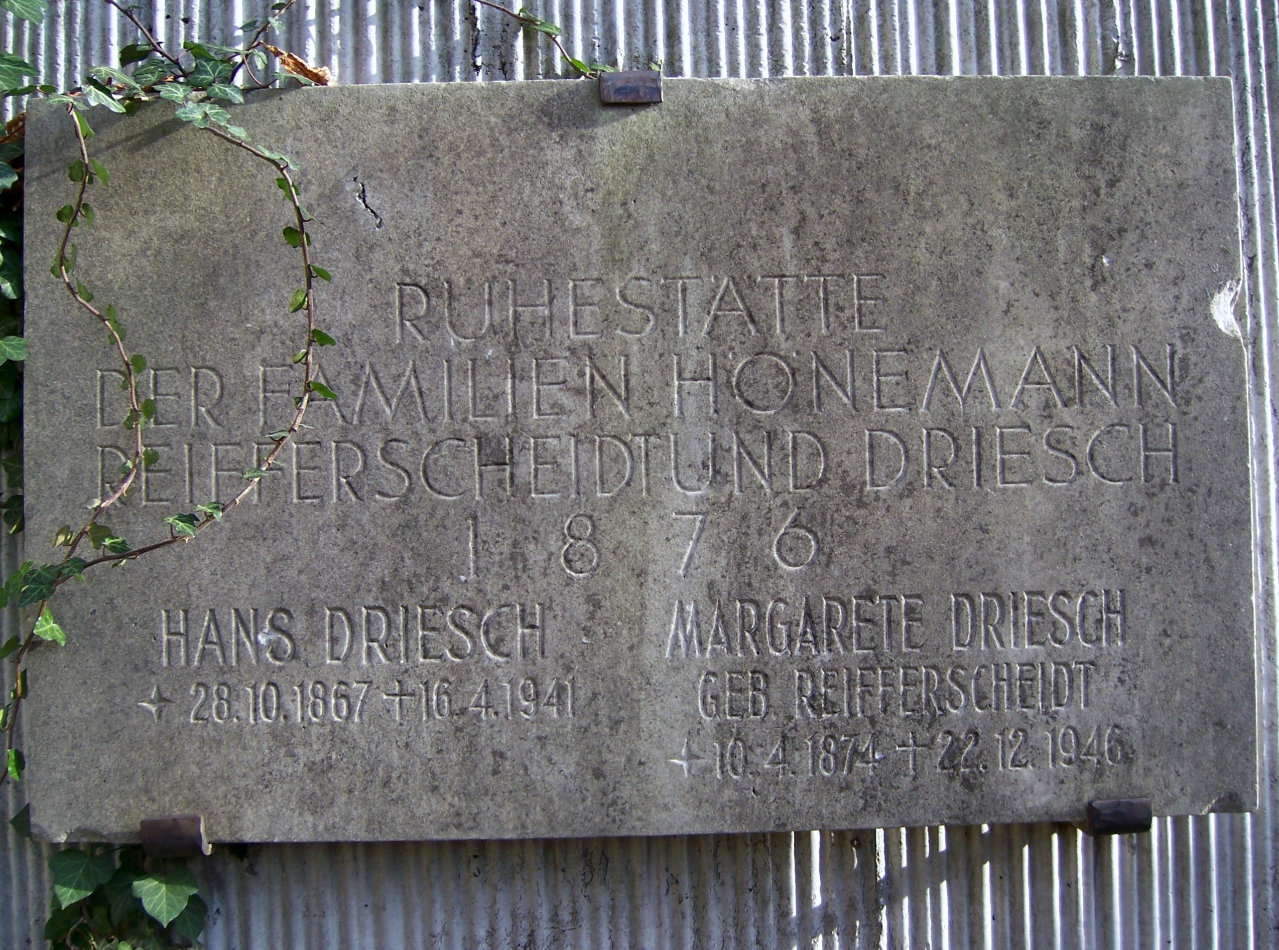 Grabtafel Hans Driesch, ursprünglich Neuer Johannisfriedhof